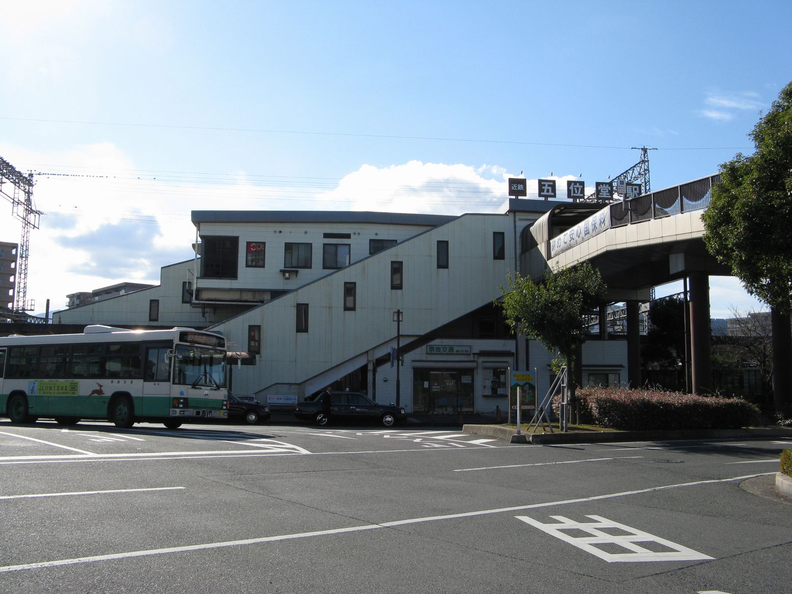 五位堂駅 駅舎